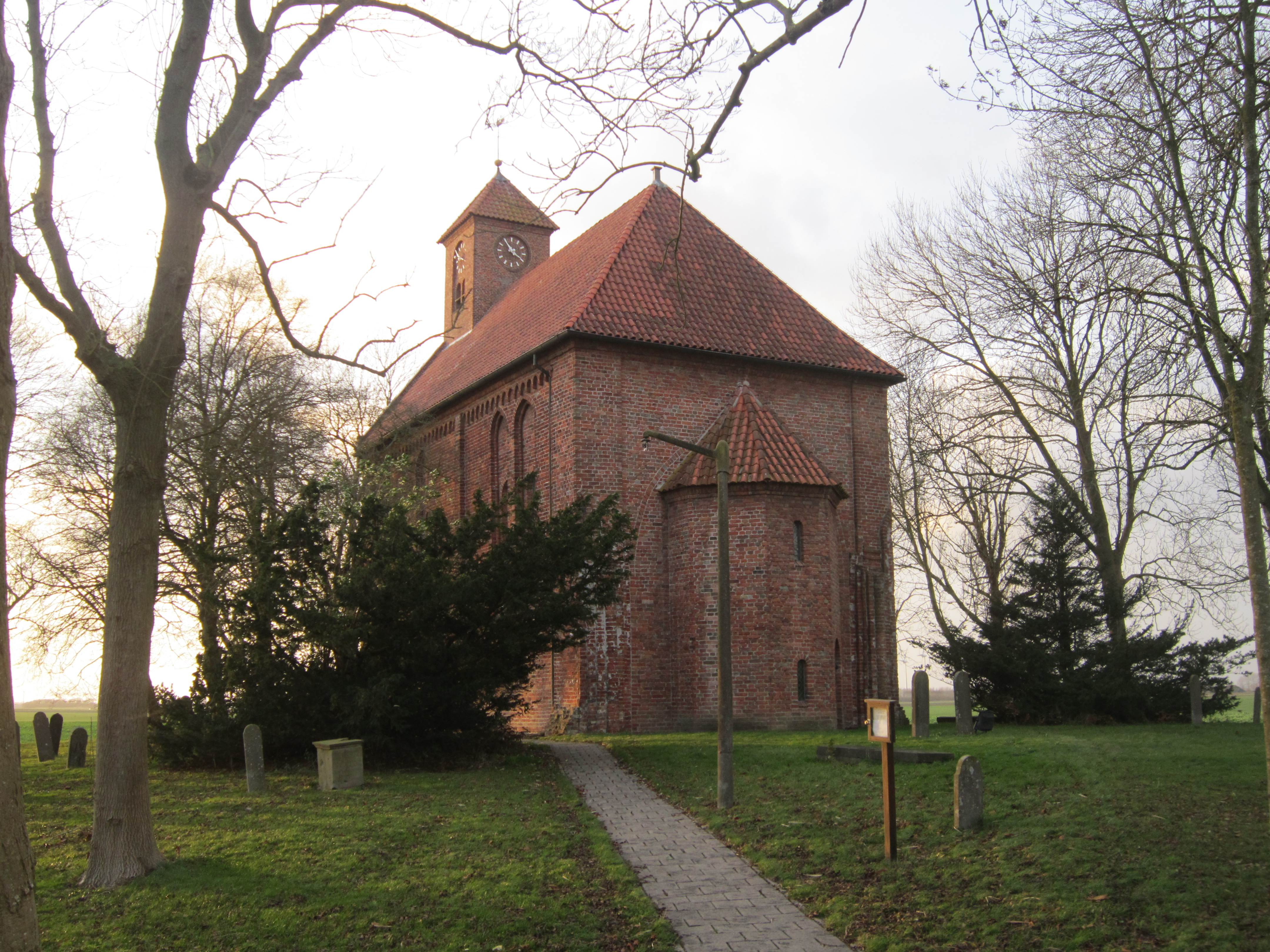 Petruskerk Woldendorp